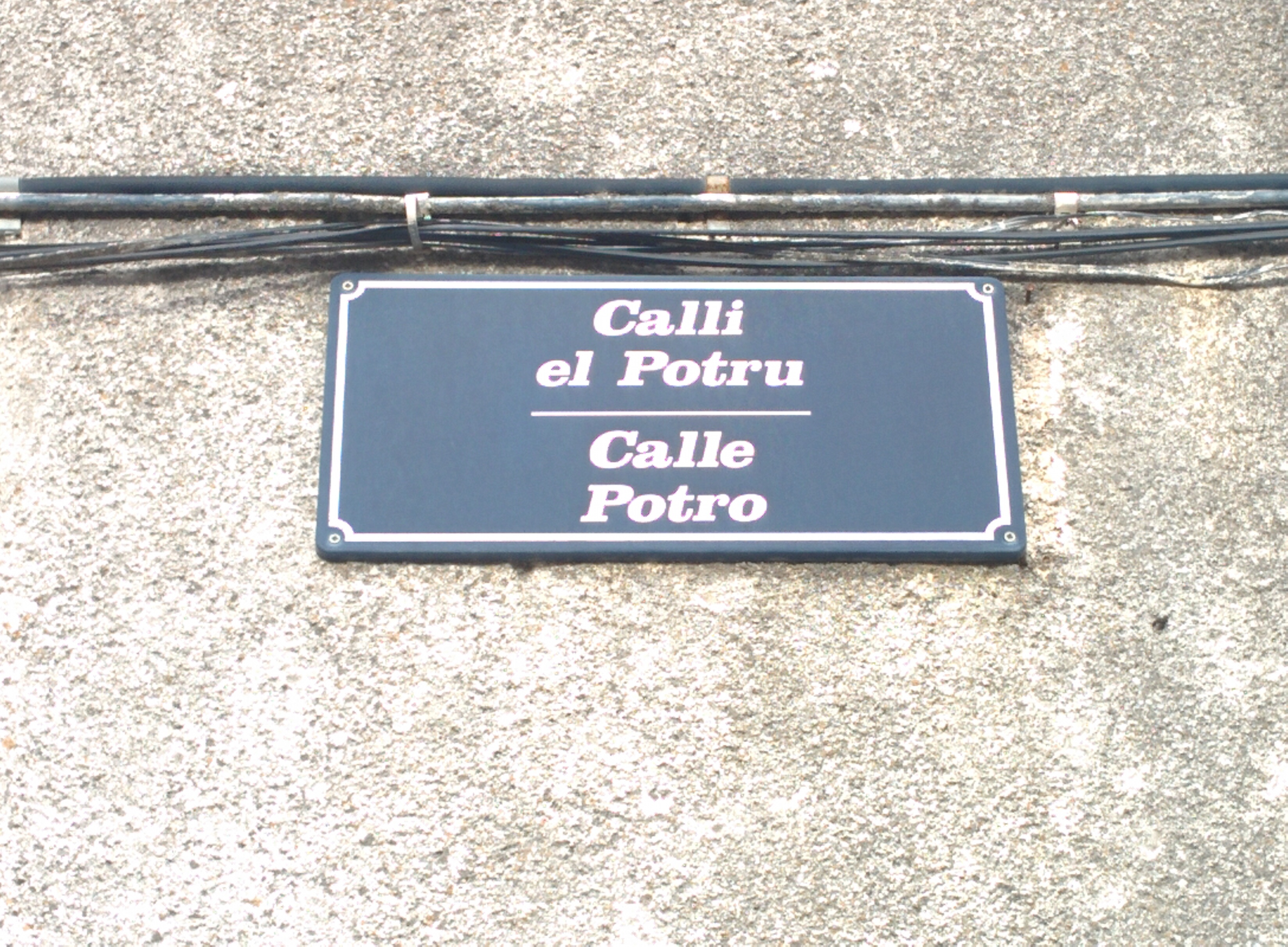 Placa de la calle Potro, en Robleda (Salamanca, España).